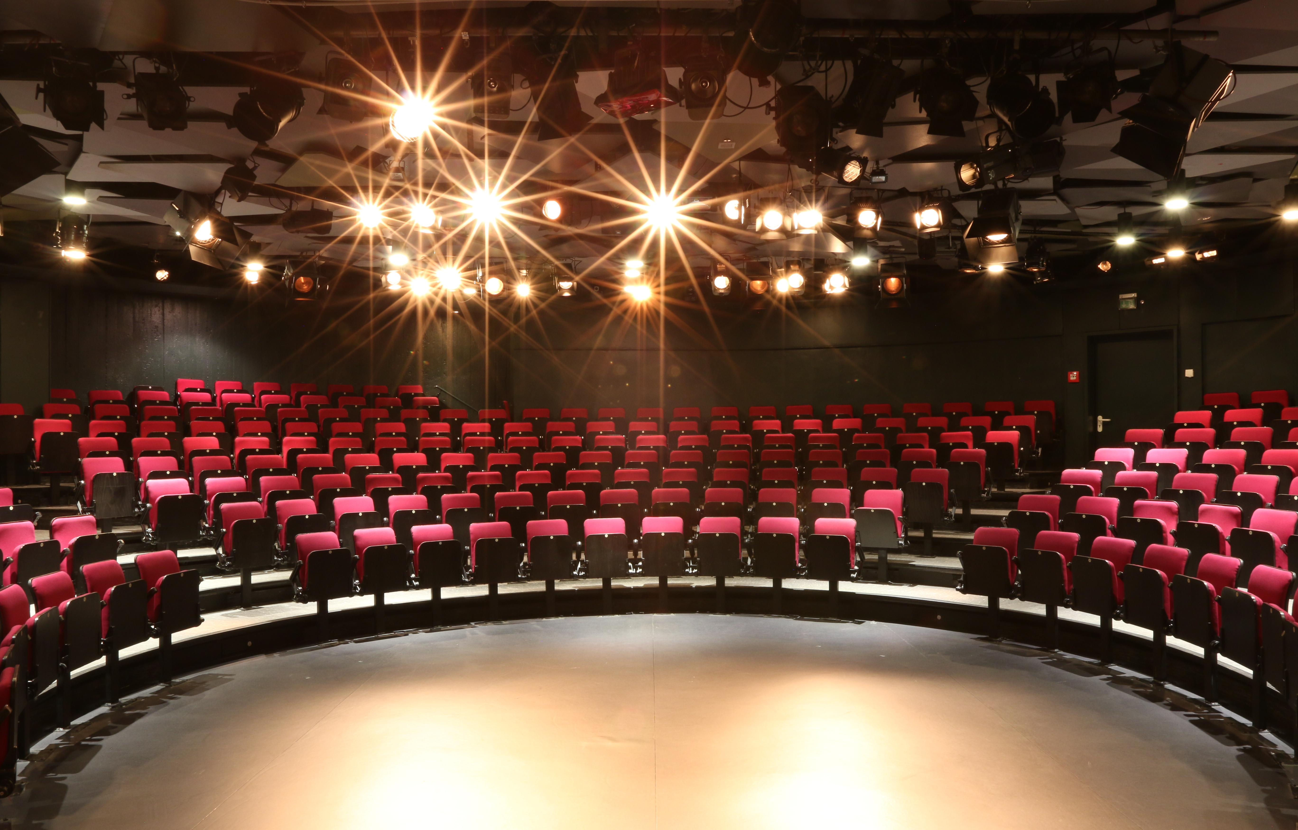 Der Theatersaal des Contra-Kreis-Theater